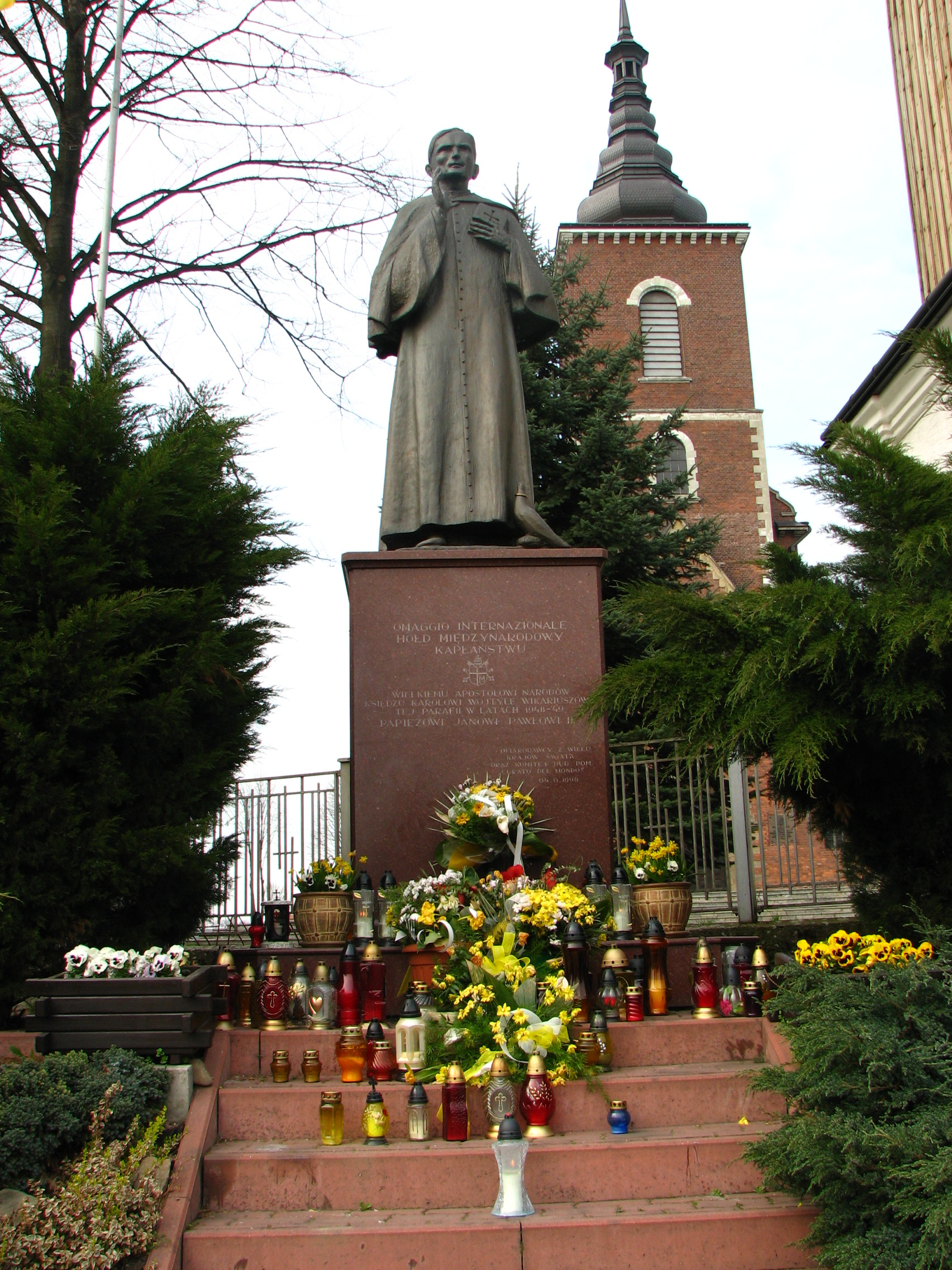 Niegowic-pomnik wikarego Wojtyly